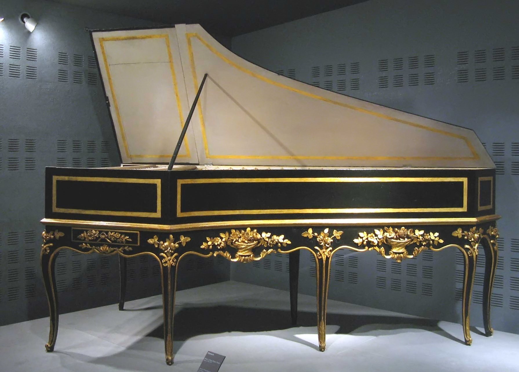 Description : Clavecin par Joseph Collesse et Jean Franky (Lyon 1775/1777) - Paris, Musée de la Musique Place : Parc de la Villette, Paris, France Date : juillet 2006 Auteur : Pline photo personnelle